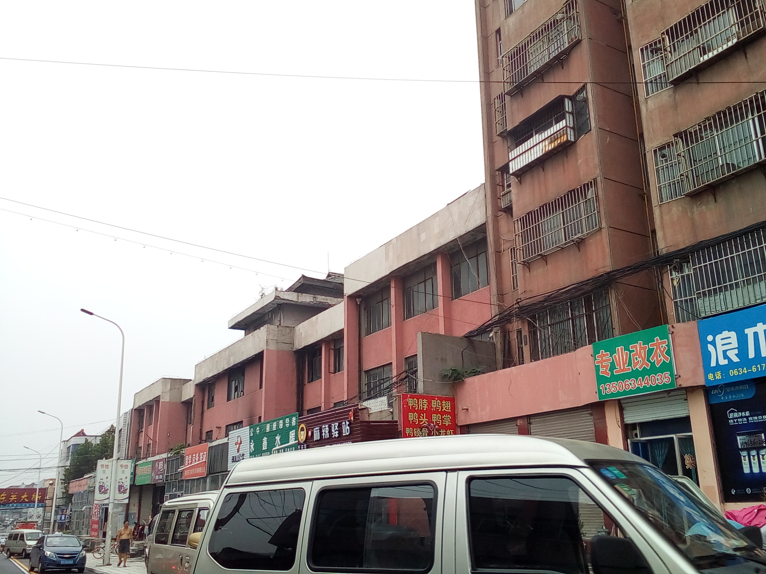 莱芜西关街沿途建筑